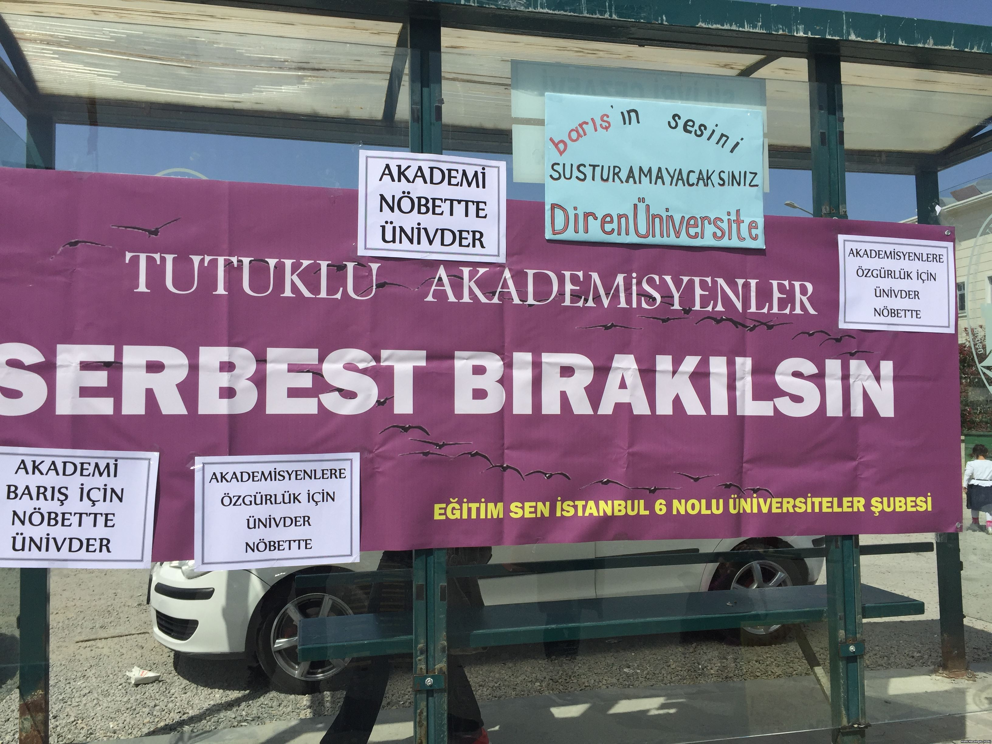 Akademisyenlerin Barış İçin Akademisyenler bildirisi yüzünden tutuklanan arkadaşlarının tutukluluk hâli için yaptığı protestoda açılan "Tutuklu Akdemisyenler Serbest Bırakılsın" pankartı.